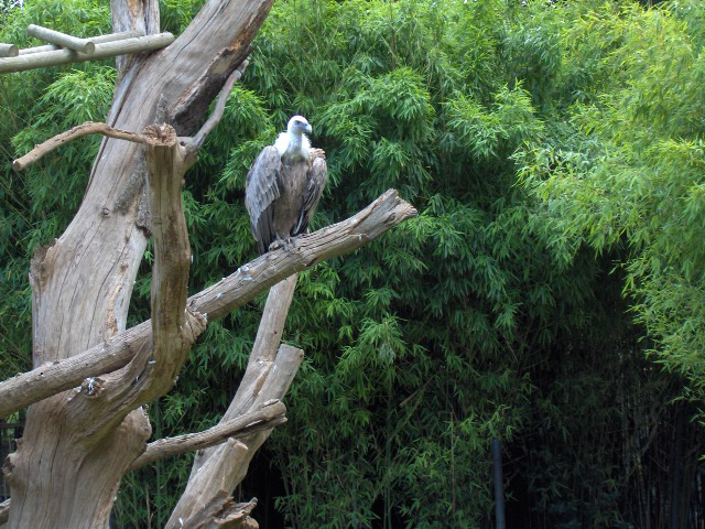 Species Gyps fulvus Family Accipitridae